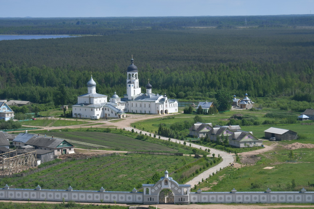 Фотография сделана 10 июня 2017 года с самолета иеромонахом Мардарием (Алексеевым). На фотографии изображен Крыпецкий монастырь и прилегающая территория.